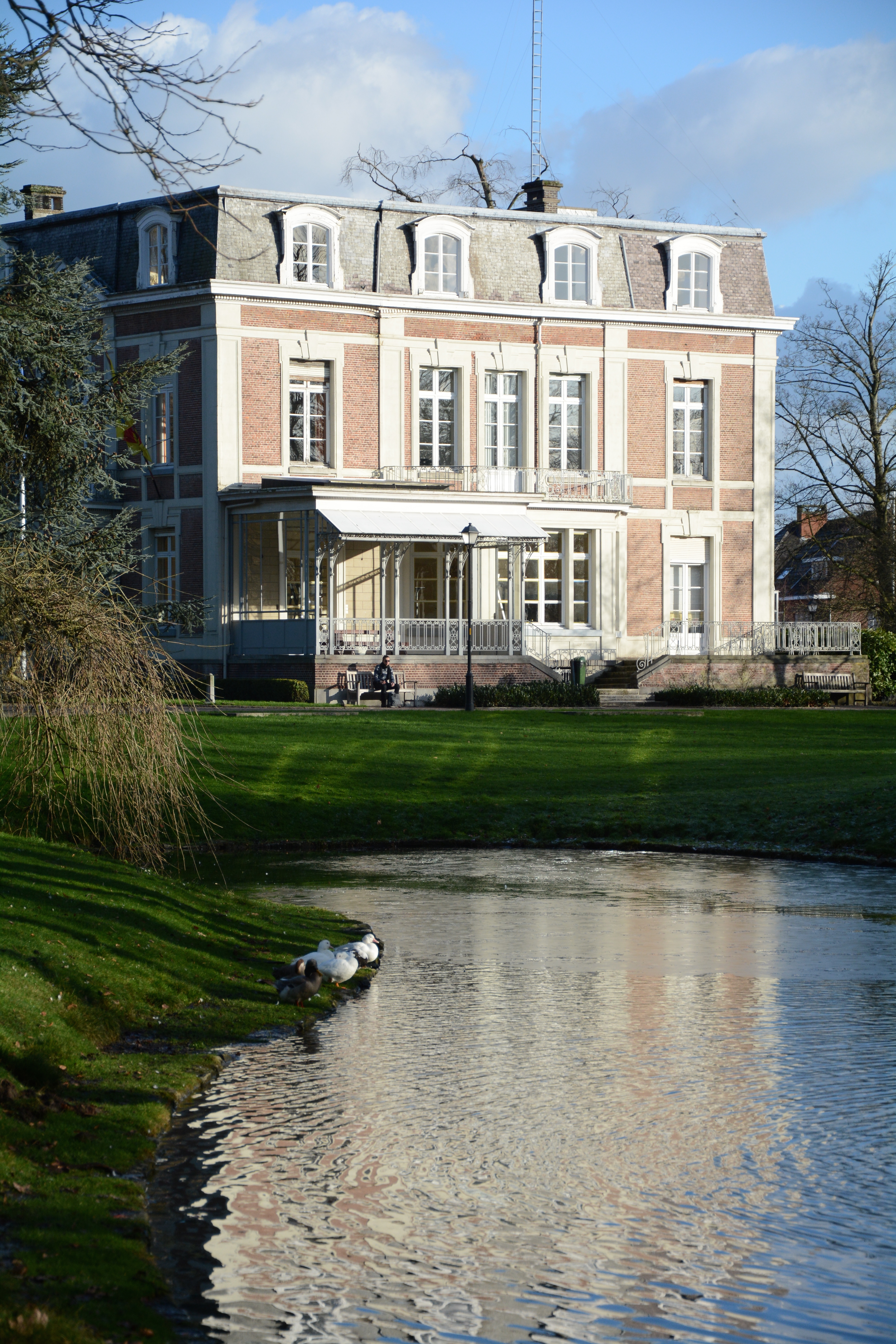 Kasteel Lindenhof met vijver, Lint, Antwerpen